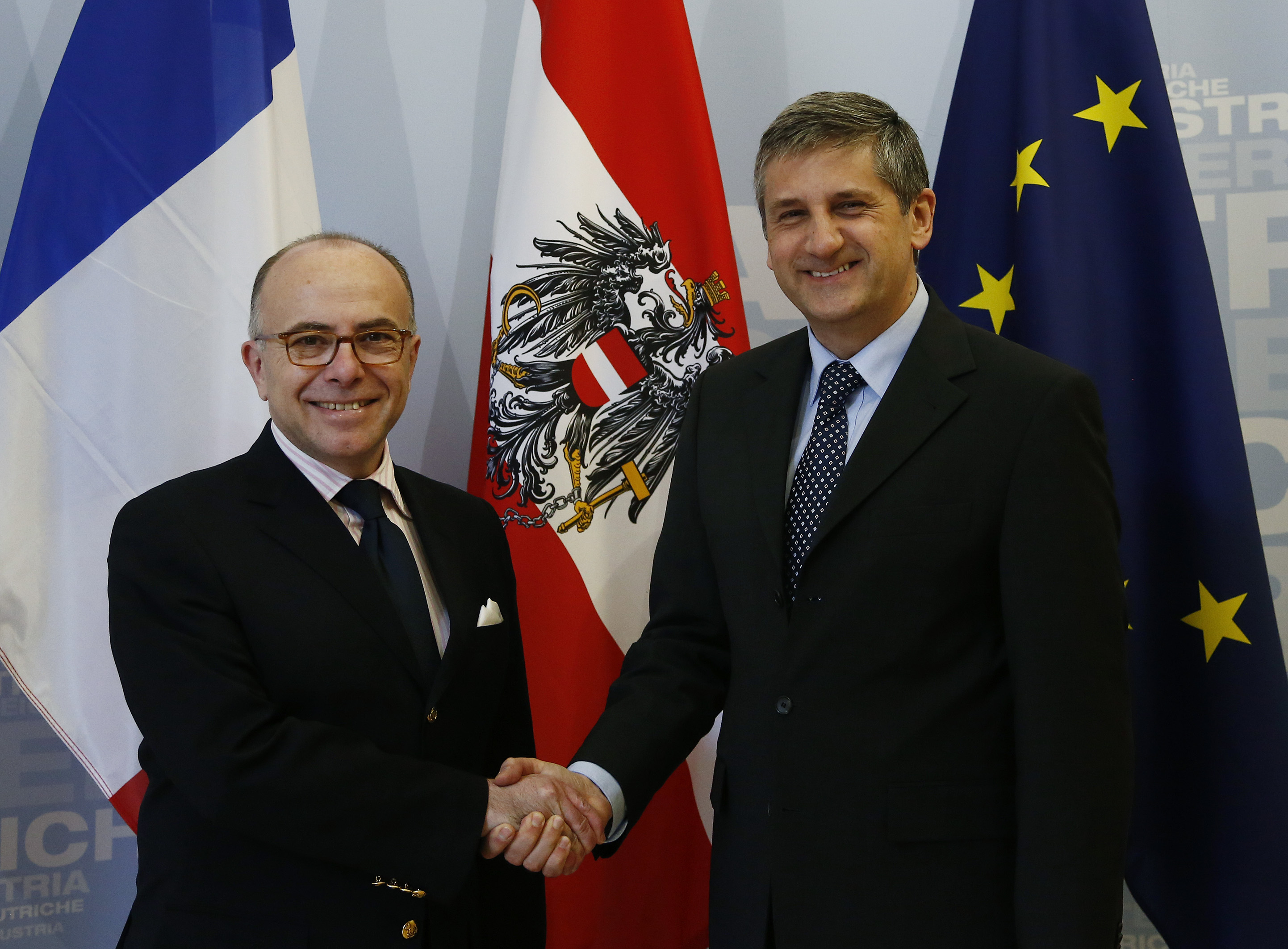 Vizekanzler Michael Spindelegger trifft den französischen Minister für EU Angelegenheiten Bernard Cazeneuve. Aussenministerium, Wien, 21.02.2013, Foto: Dragan Tatic